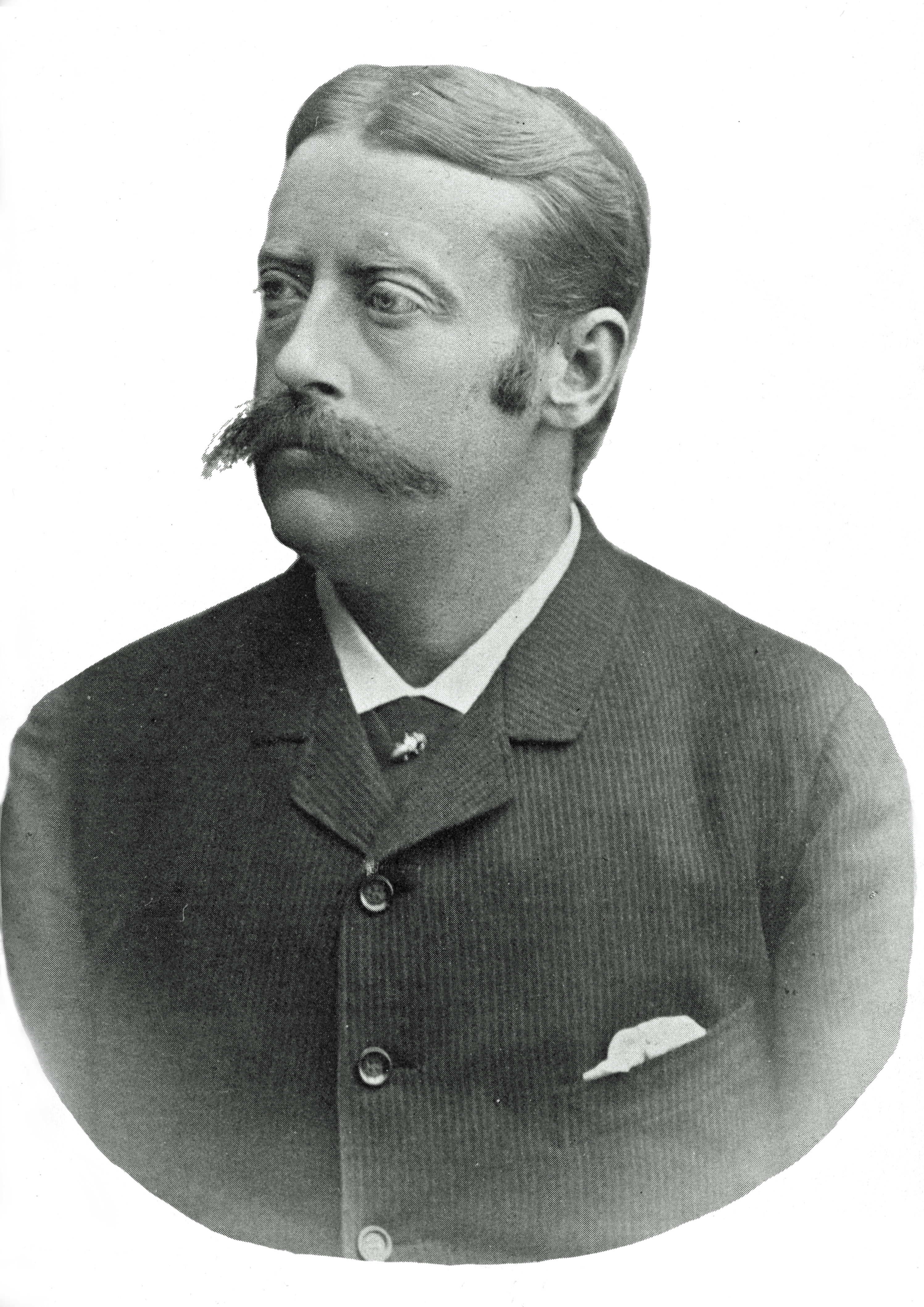 Riksdagsman Severin Axell (1843-)